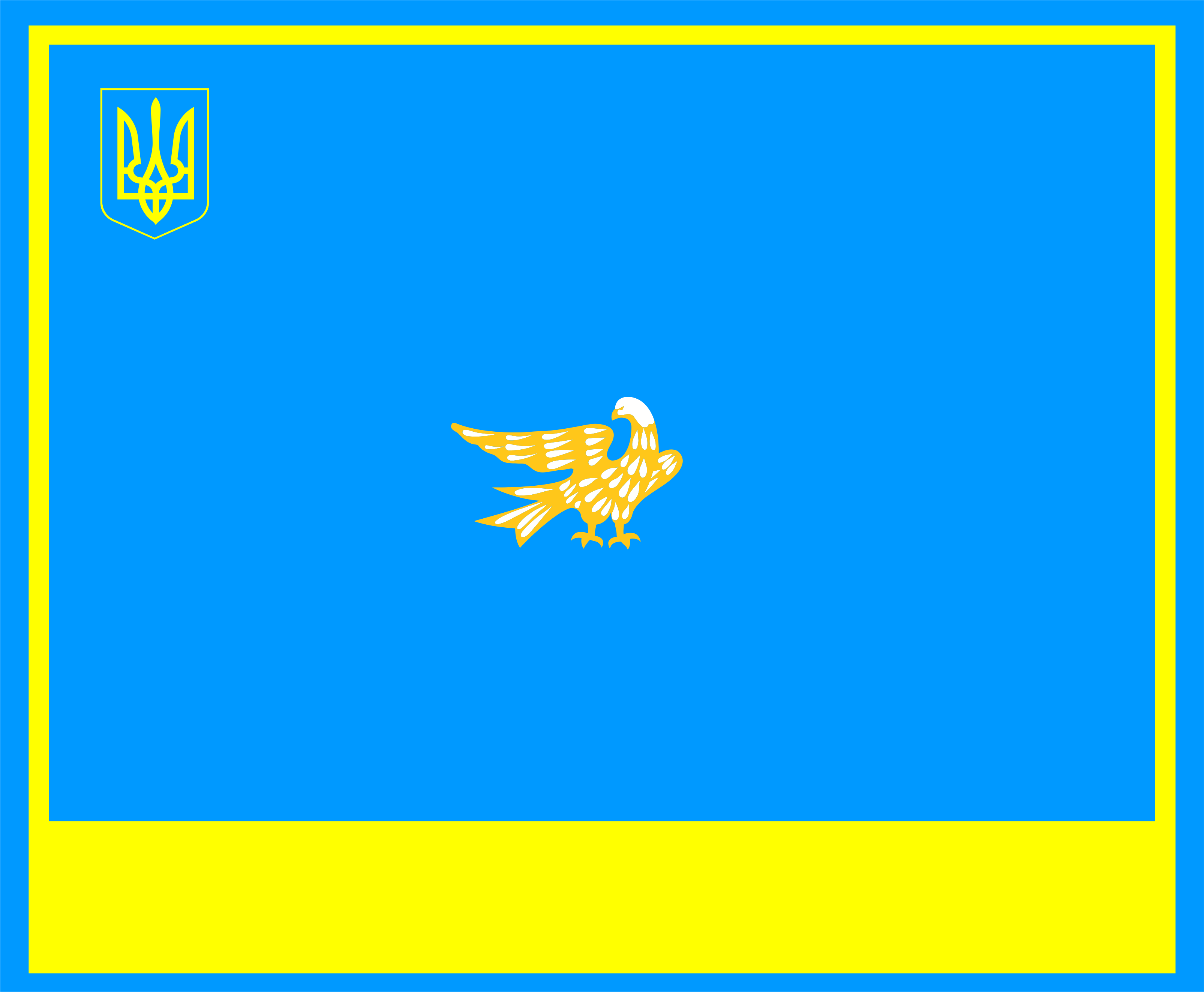 Прапор міста Сєвєродонецька Луганської області (Україна)